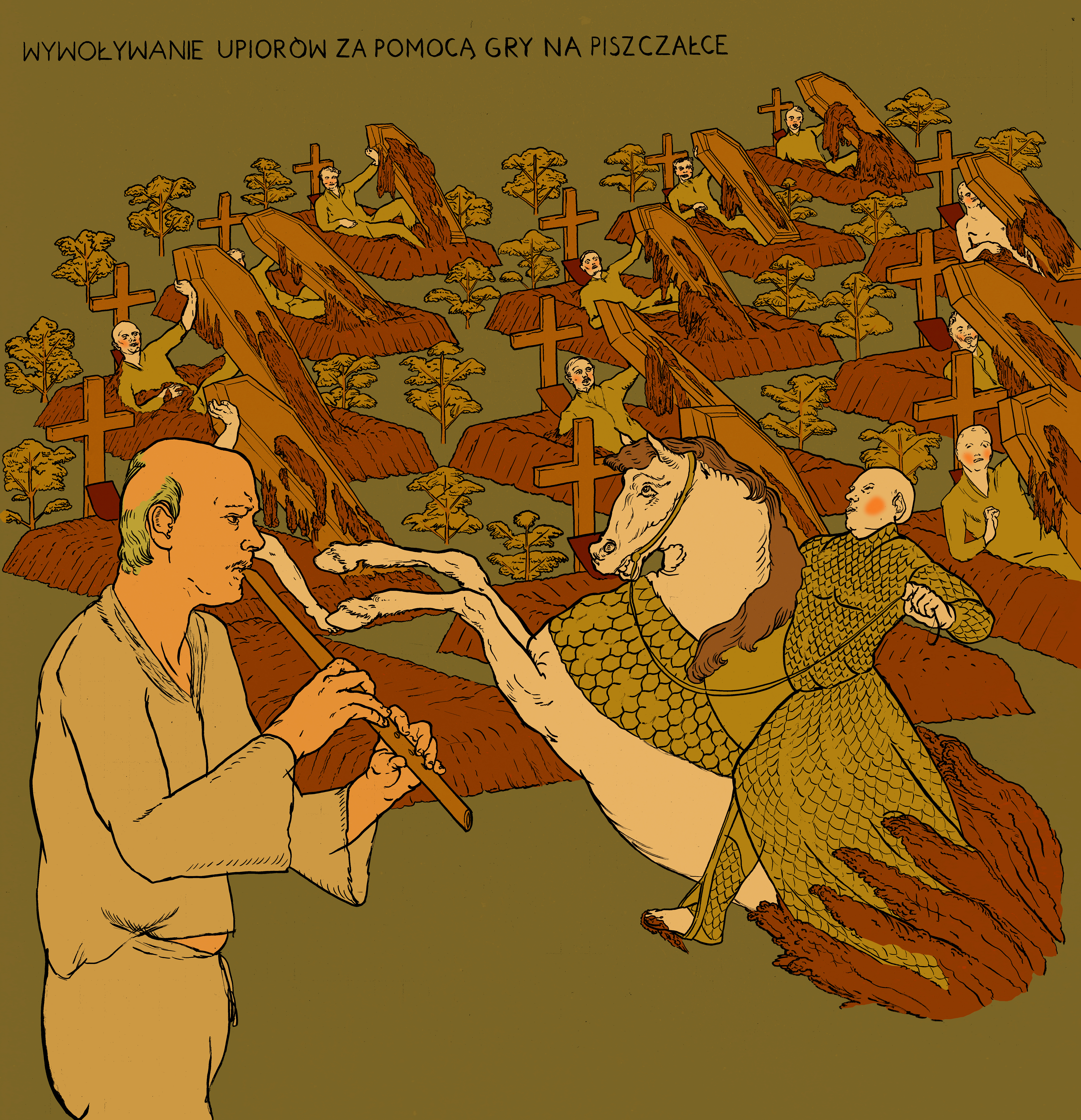 Grafika Macieja Sieńczyka do tekstu Oskara Kolberga na temat upiorów i wywoływania ich za pomocą gry na piszczałce na cmentarzu (Lubelskie, Cz. 2)